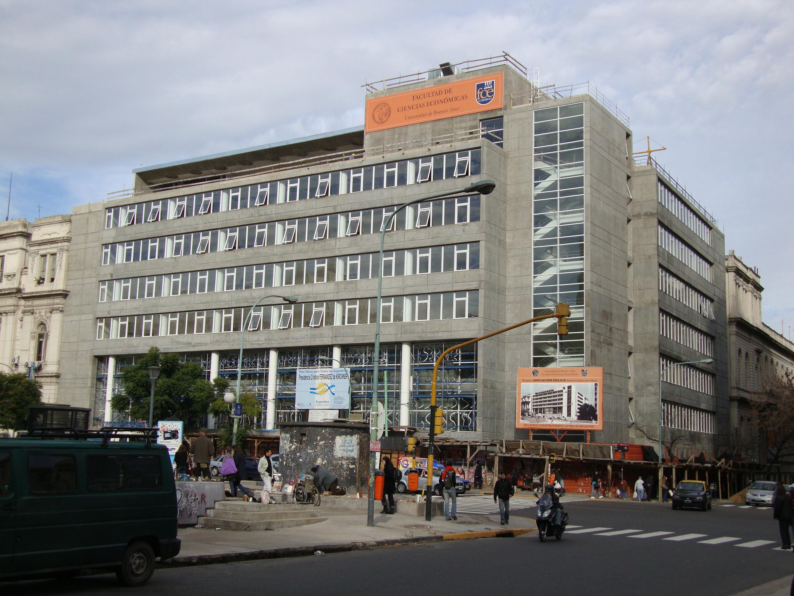 Anexo de la Facultad de Económicas de la Universidad de Buenos Aires, inaugurado en 2010.